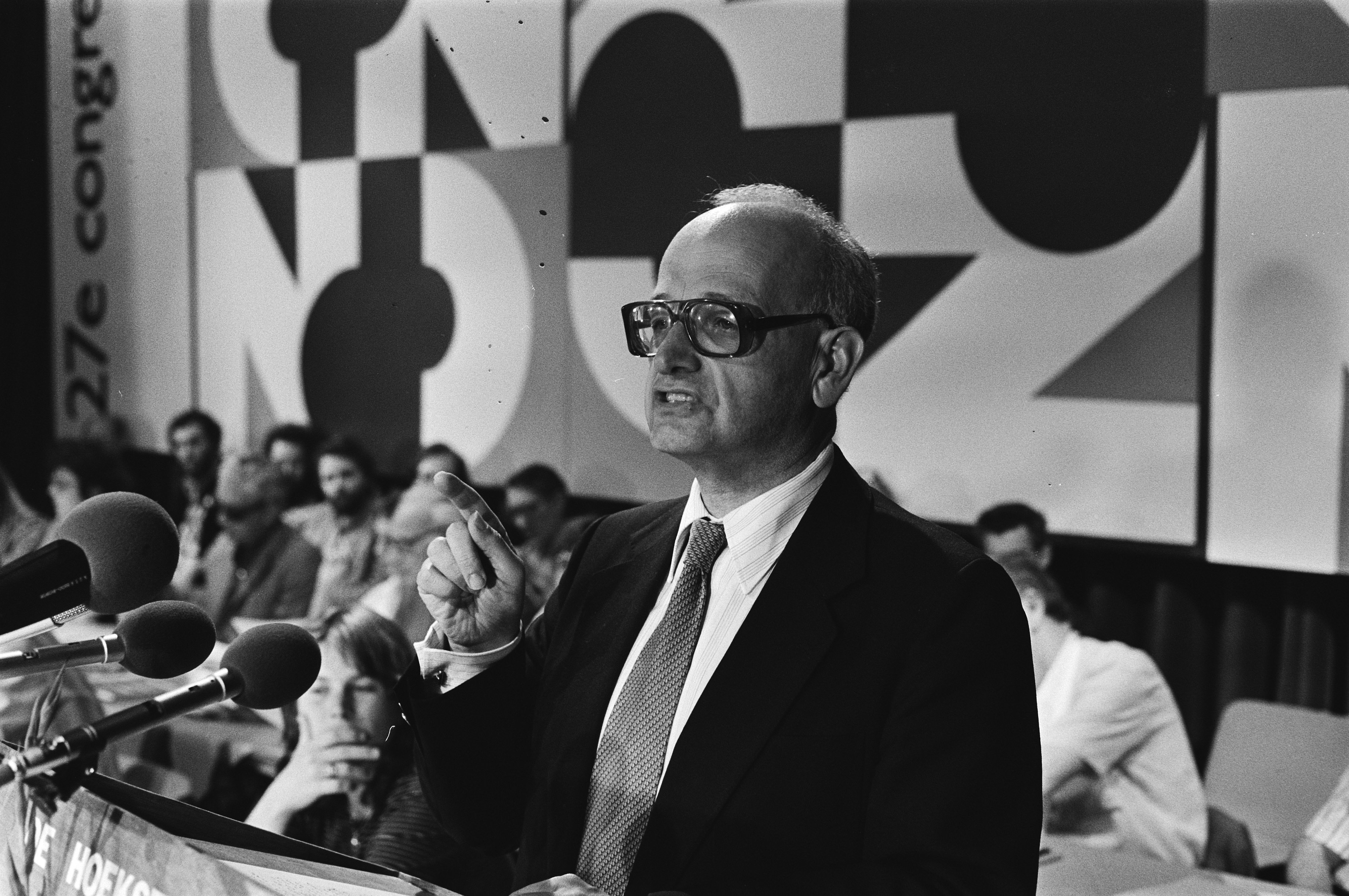 Collectie / Archief : Fotocollectie Anefo Reportage / Serie : CPN congres Beschrijving : Wolff tijdens rede Datum : 7 juni 1980 Trefwoorden : congressen, politiek, politieke partijen, toespraken Persoonsnaam : Wolff, Joop Fotograaf : Antonisse, Marcel / Anefo Auteursrechthebbende : Nationaal Archief Materiaalsoort : Negatief (zwart/wit) Nummer archiefinventaris : bekijk toegang 2.24.01.05 Bestanddeelnummer : 930-8677